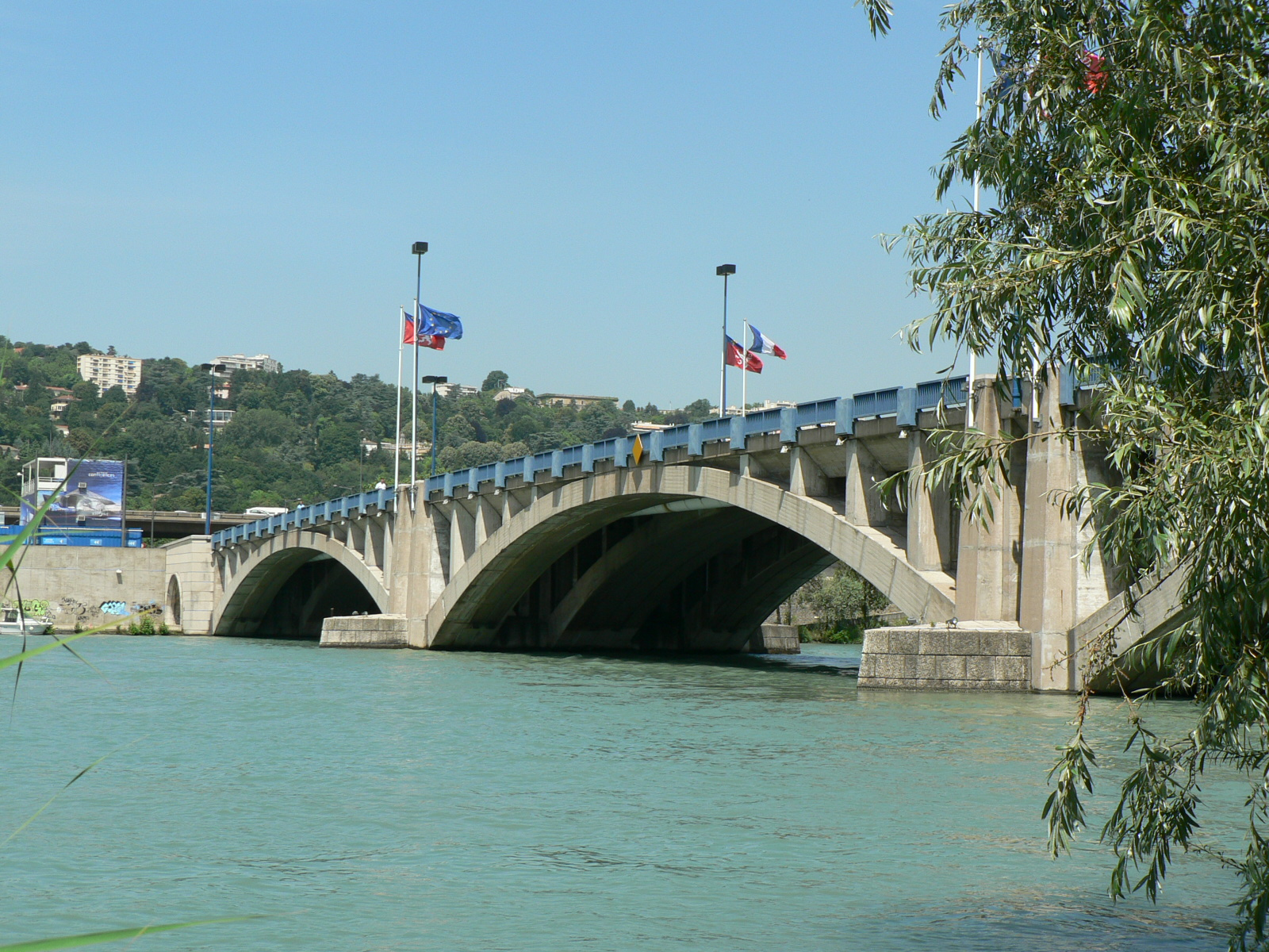 Ponts de Lyon - Pont Pasteur